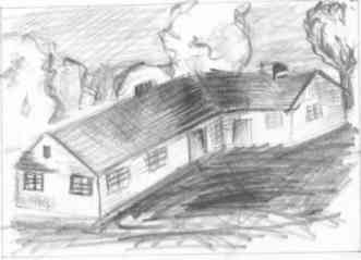 Wygląd dworu w okresie międzywojennym